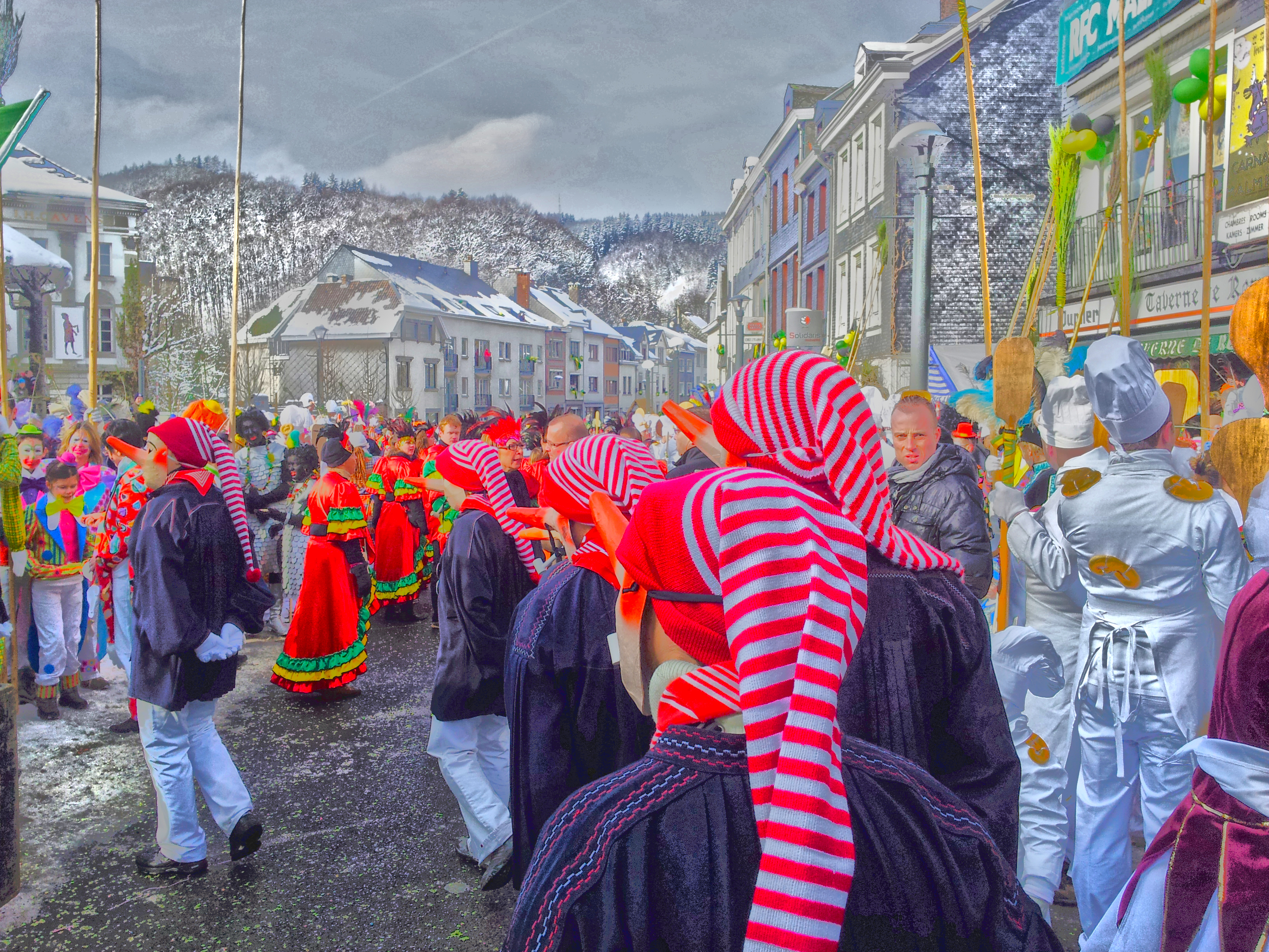 Carnaval de Malmedy 2013. Jour du dimanche avec Long-Nés, Boldjîs et Longuès-Brèsses. Photo HDR.